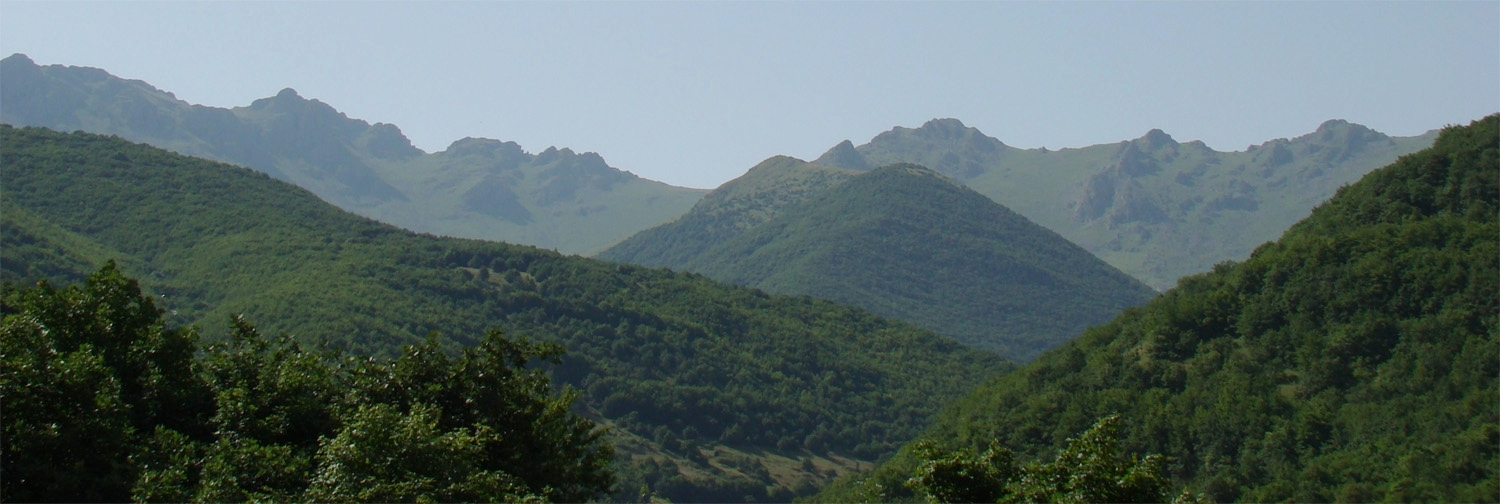 جنگلهای ارسباران